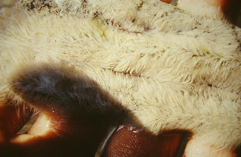 Feuille de rubanier asphyxiée par la pullulation de bactéries filamenteuses, dans l'Aa où ce phénomène était constant sur 10 km environ dans les années 1985-1990. C'est sur cette section de l'Aa qu'on a identifié des souches mutantes de bactéries chlororésistantes (Nord-Nature Saint Omer, SOS Nature-Défense des milieux humides). La situation s'est fortement améliorée depuis 1995 concernant la qualité de l'eau, avec l'extension de la station d'épuration de l'usine et des changements de process. Il y a eu aussi des pollutions accidentelles, ou de lessivage suivant des pluies d'orage.